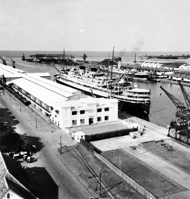 Repronegatief. Etablissement S.M.N. met de 'Johan van Oldenbarnevelt' in Tandjoengpriok, de haven van Batavia, Java